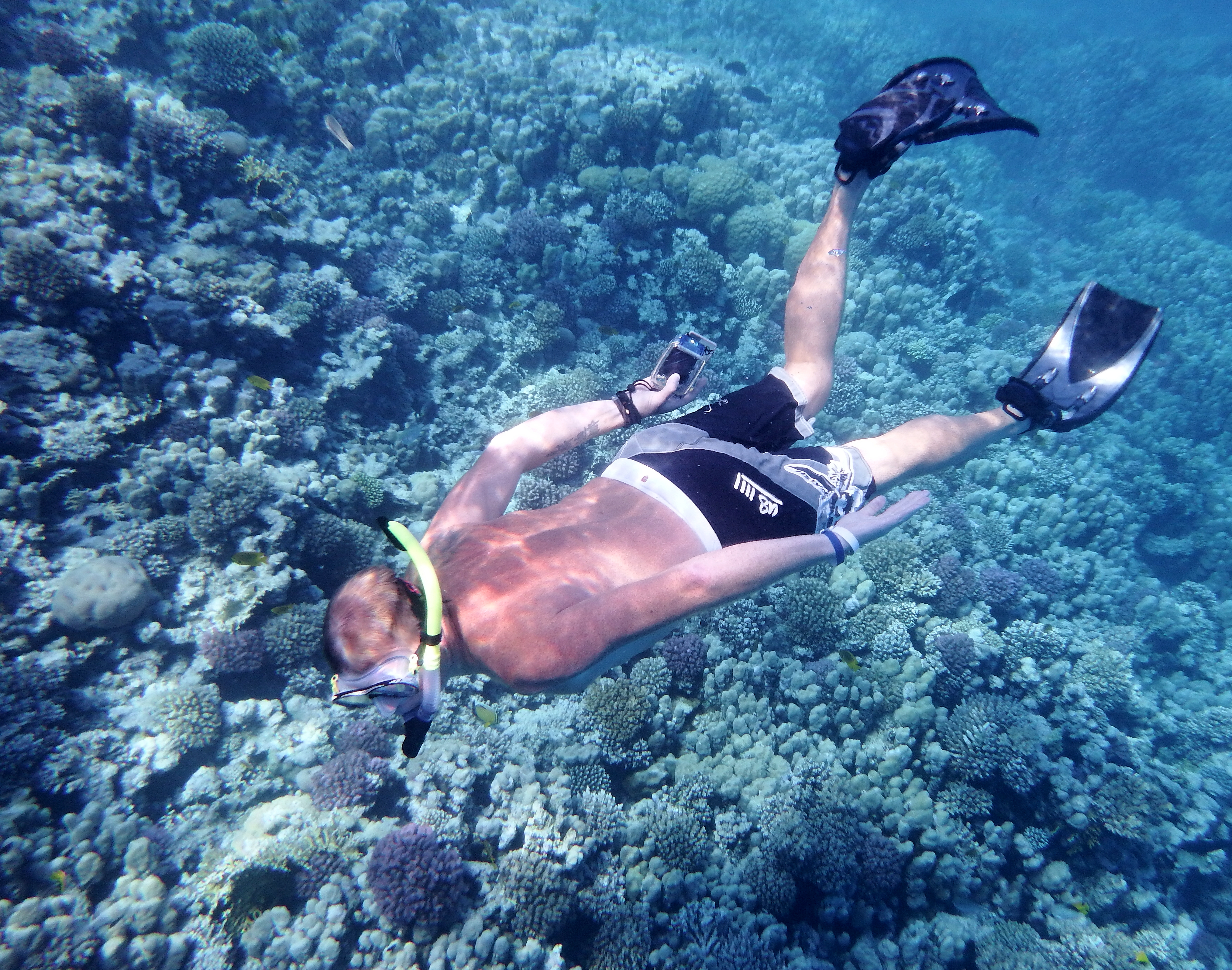 Unterwasserfotograf im Roten Meer.